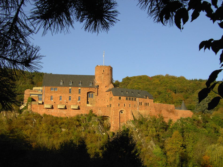 Burg Hengbach in Heimbach in der Eifel